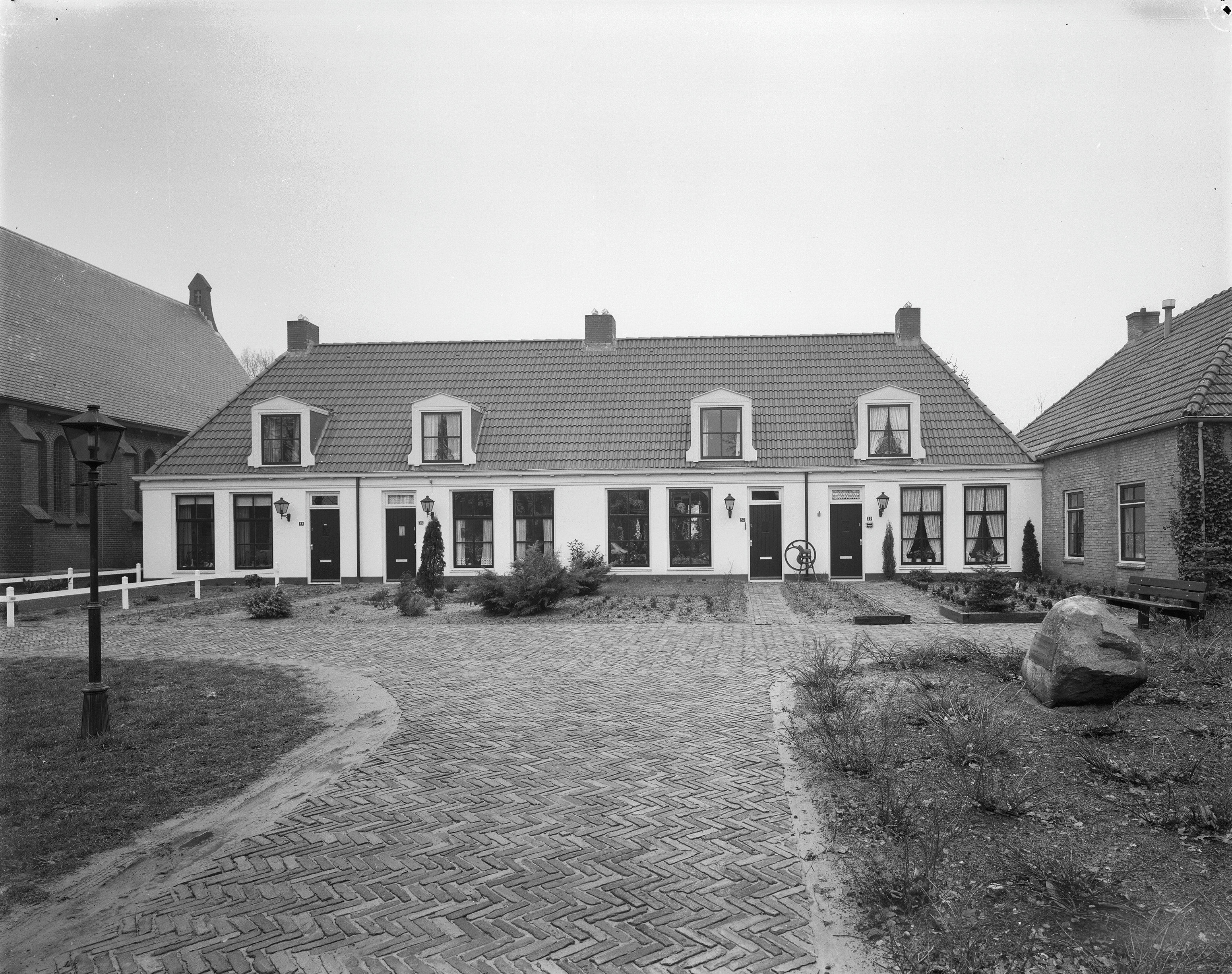 voorgevels